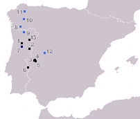 Localização geográfica das inscrições lusitanas.